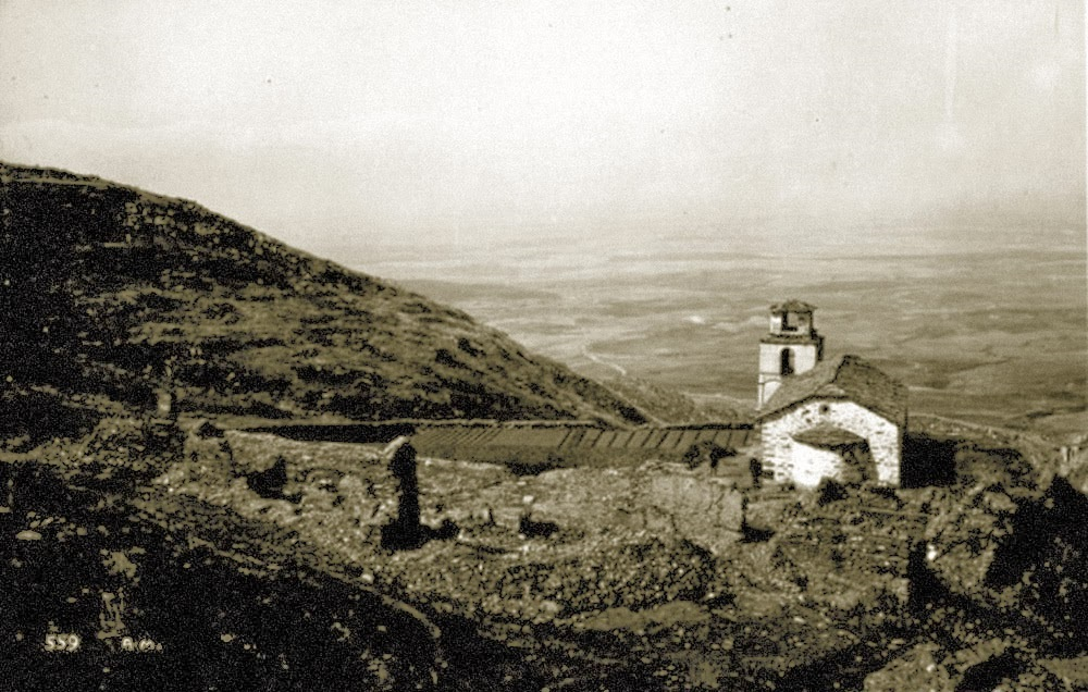 Paralovo monastery, Macedonia